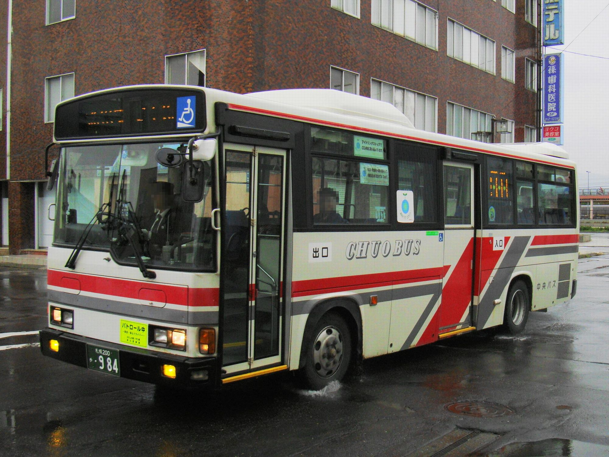 Bibai to Takikawa